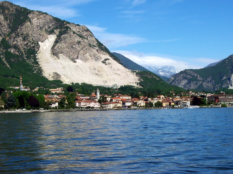 Baveno vista dall'Isola dei Pescatori